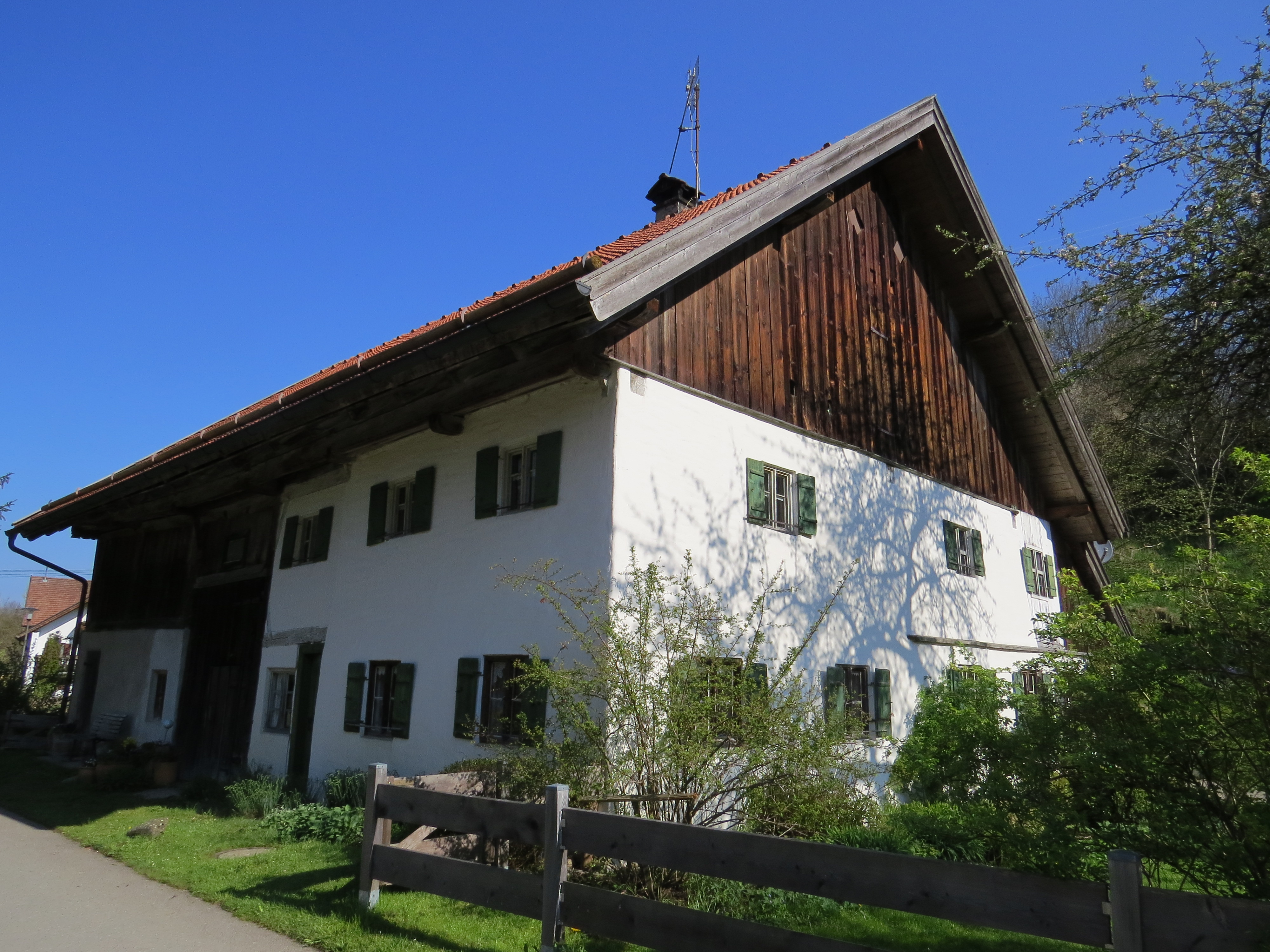 Schlögelmühlstr. 3 in Steingaden